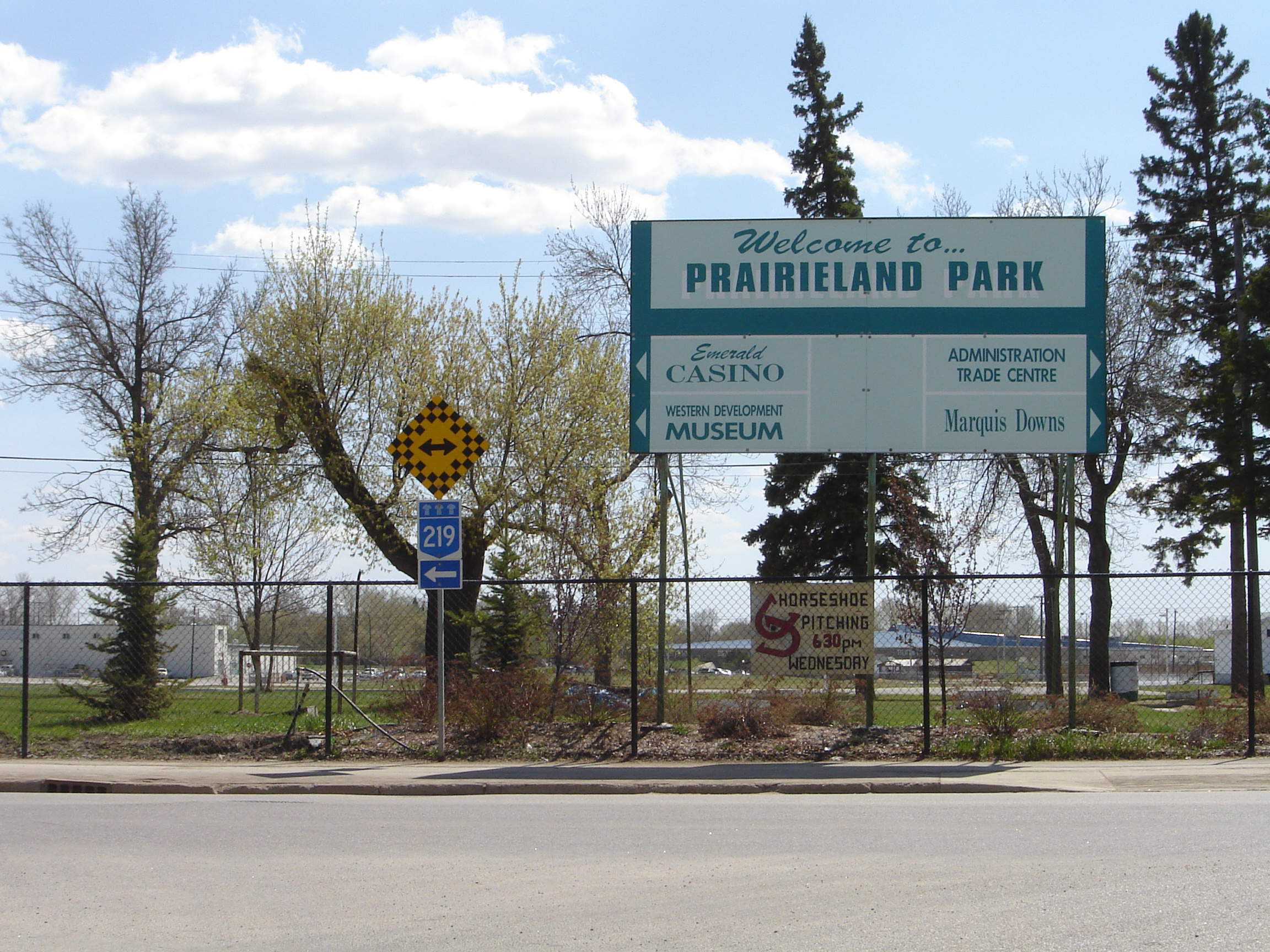 Prairieland Park Exhibition, Saskatoon Saskatoon, Saskatchewan, Canada